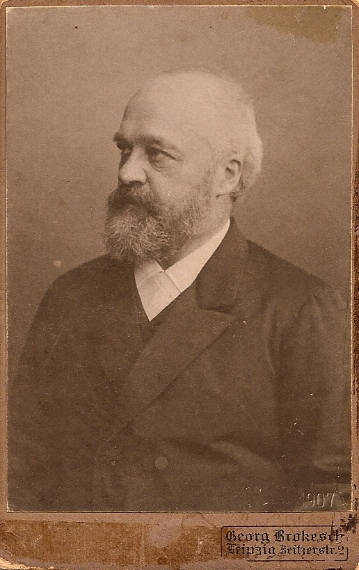 Portraitfoto Geheimrat Prof. Dr. jur. Oskar von Bülow